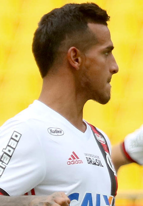 Guayaquil, martes 13 de marzo del 2018 (Andes).-El equipo brasileño Flamengo entrenó en el estadio Monumental previo al partido contra Emelec por el grupo D de la Copa Libertadores a jugarse mañana miércoles en el estadio George Capwell. Foto:Andes/César Muñoz